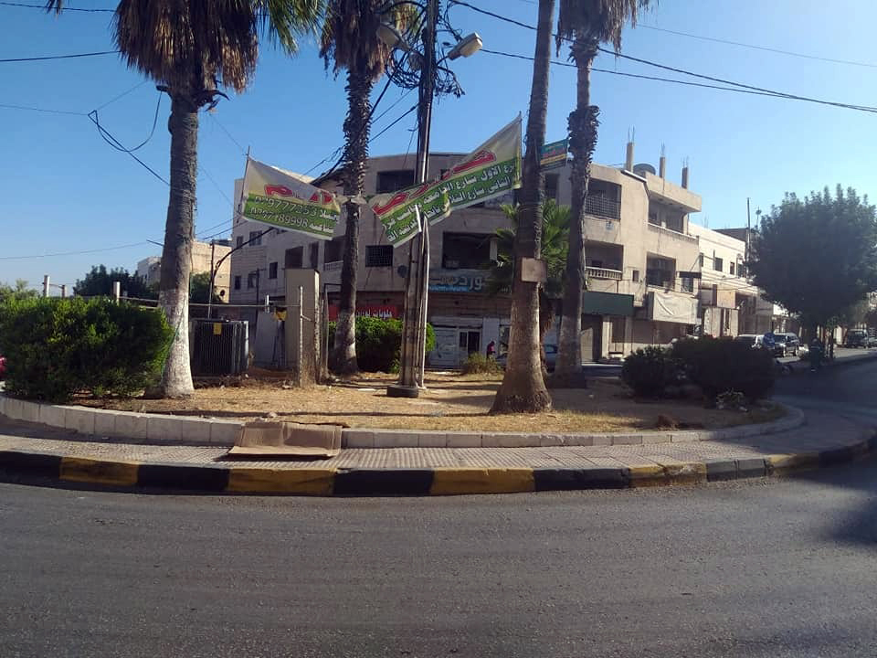 تسمية دوار شركة الكهرباء باسم الدكتور رضوان السعد